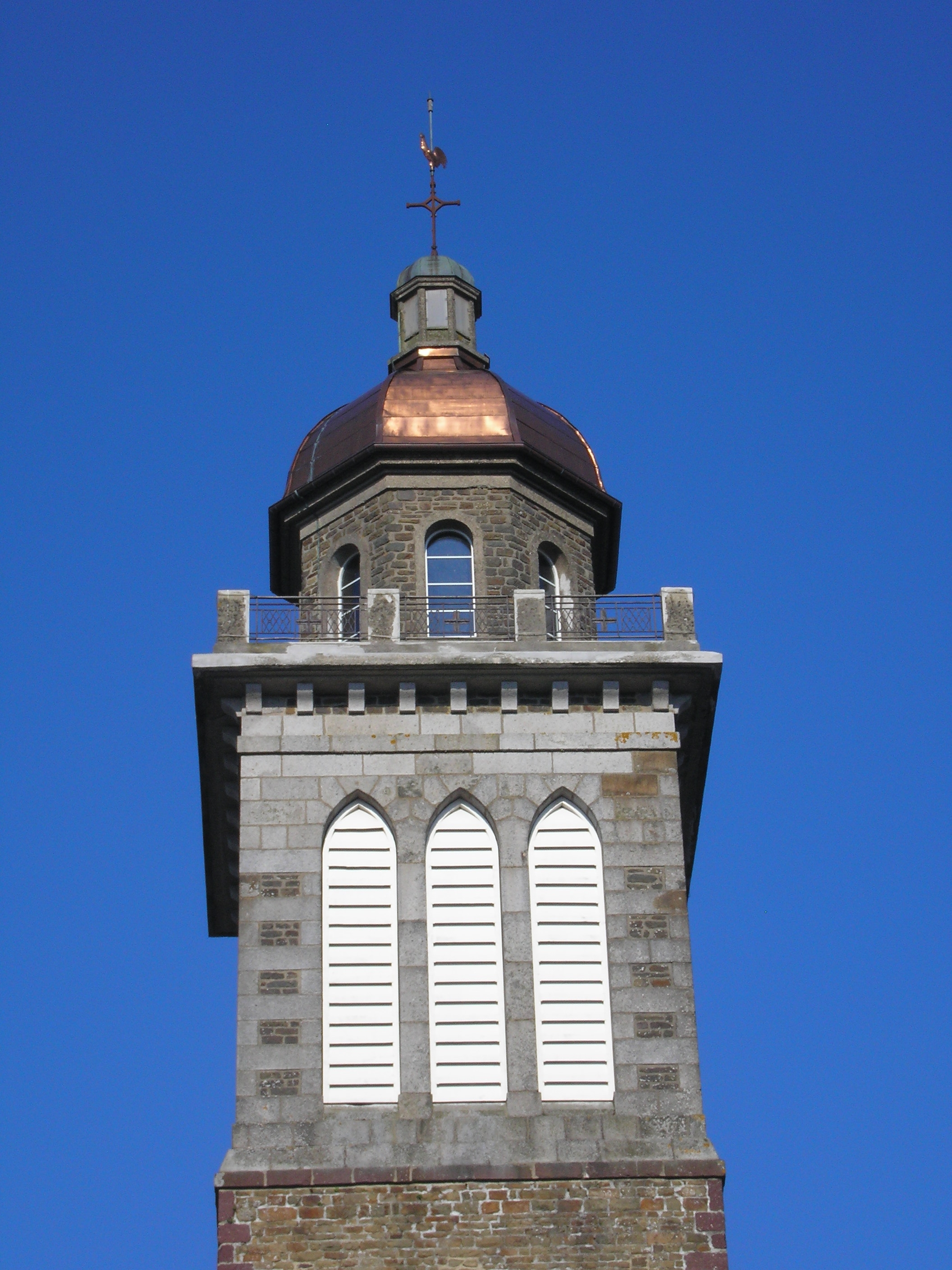 Saint-Amand (Normandie, France). Le clocher de l'église.